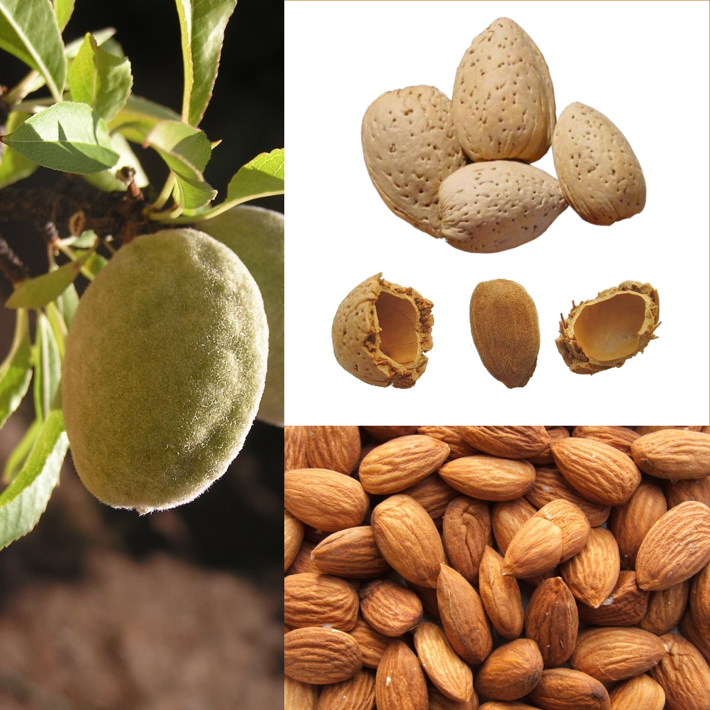 Grafika podręcznika Wikijunior:Owoce. Migdał, nasiono owocu śliwy migdał (Prunus dulcis).